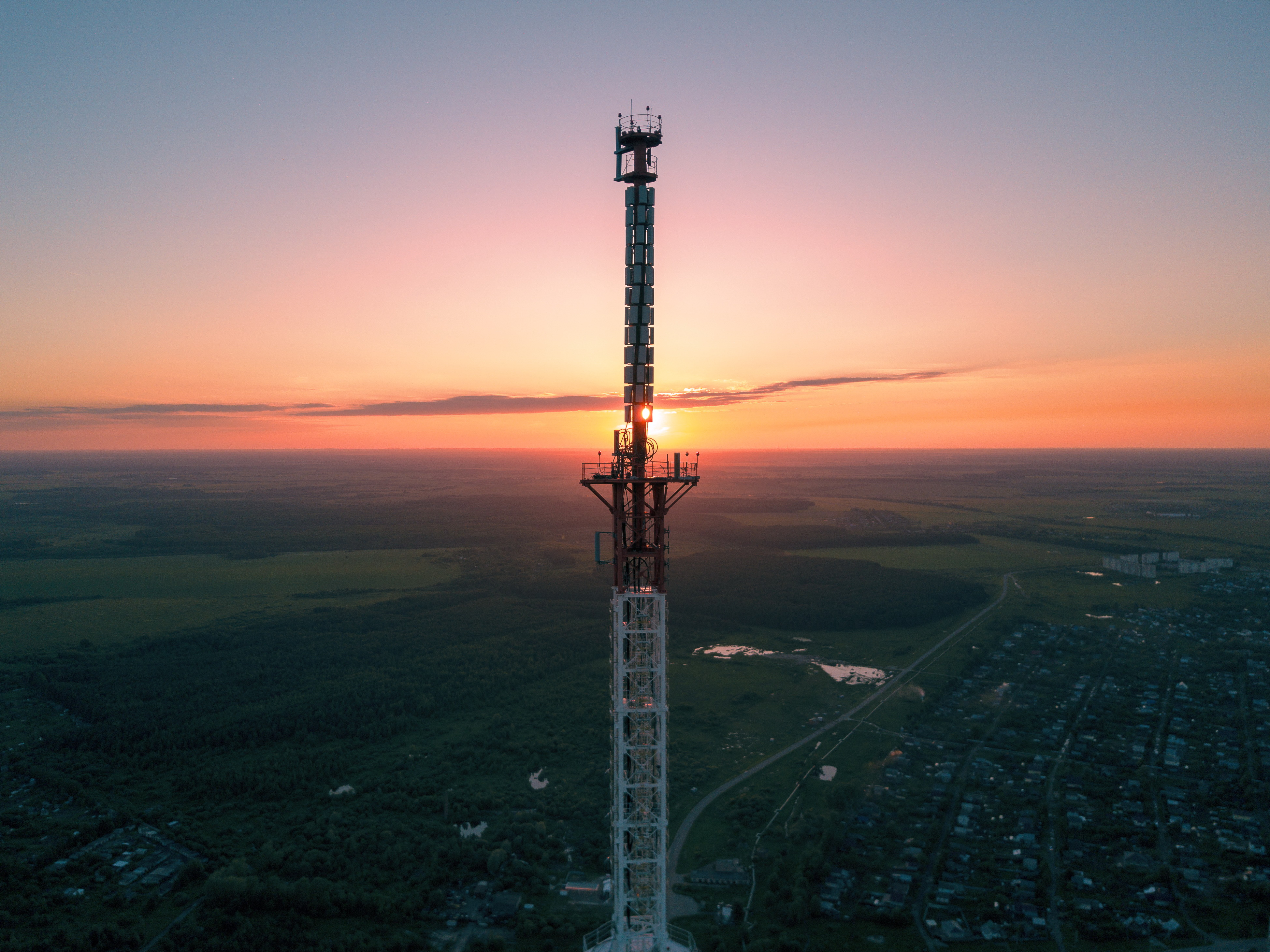 Антенна телемачты в городе Родники Ивановской области